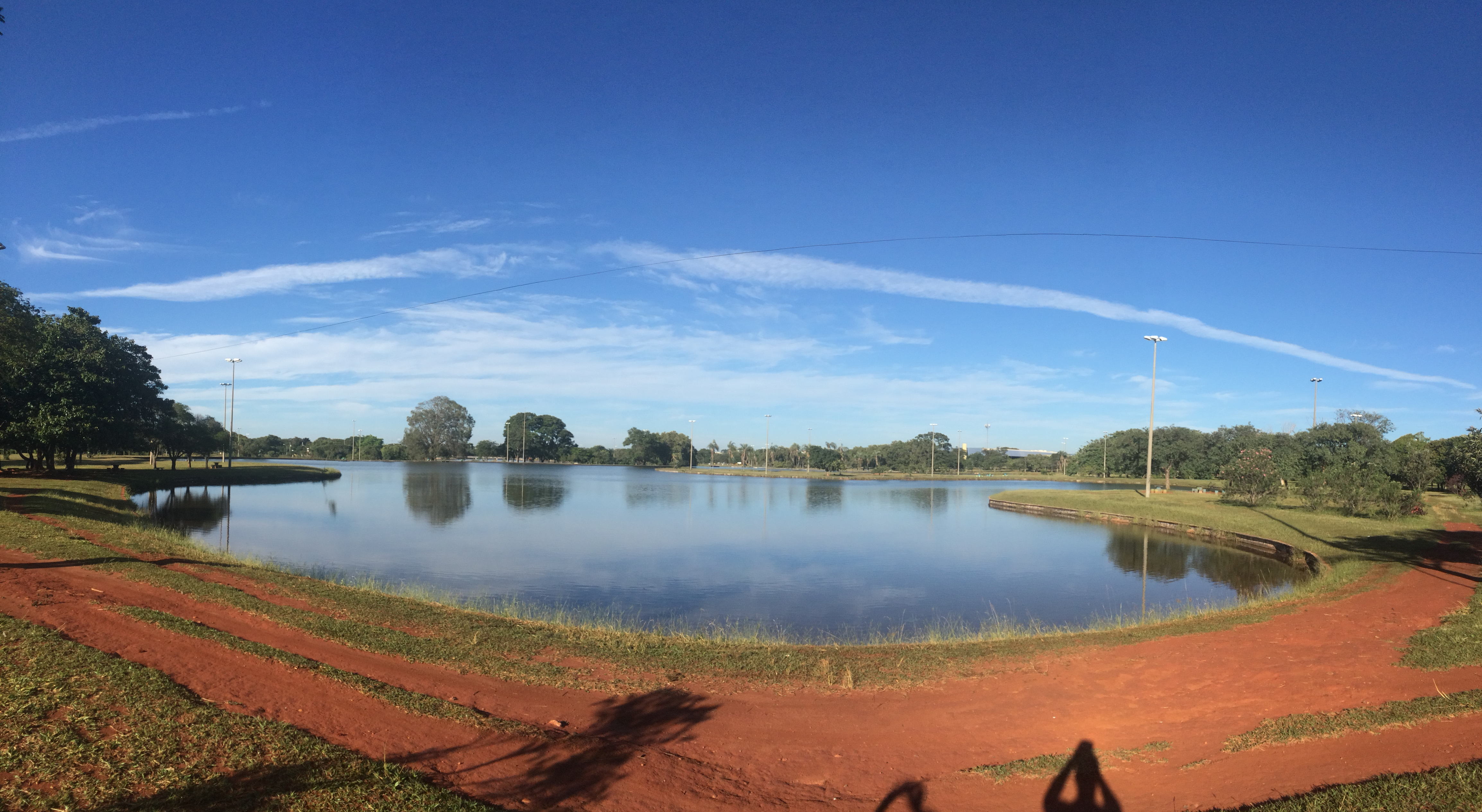 Parque da Cidade - Brasília, DF